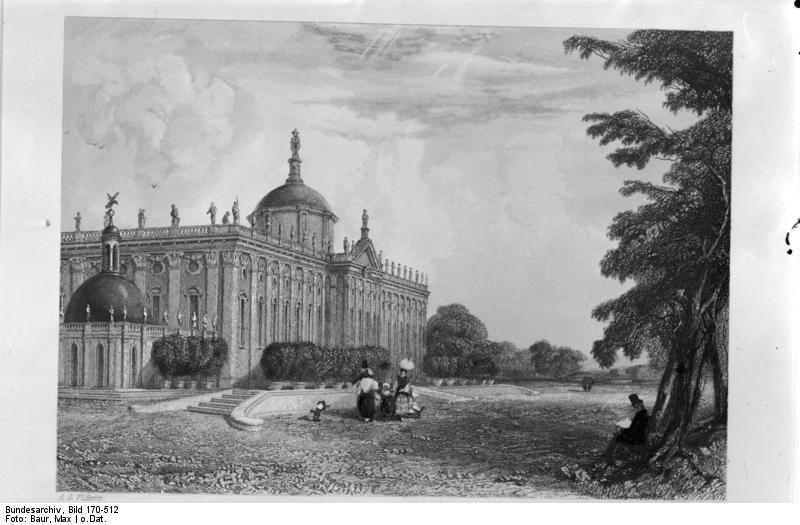 Potsdam.- Neues Palais